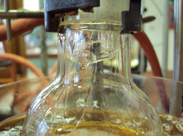 Detail van reflux waarbij het terugvloeien van de refluxende vloeistof vanaf de bolkoeler duidelijk zichtbaar is